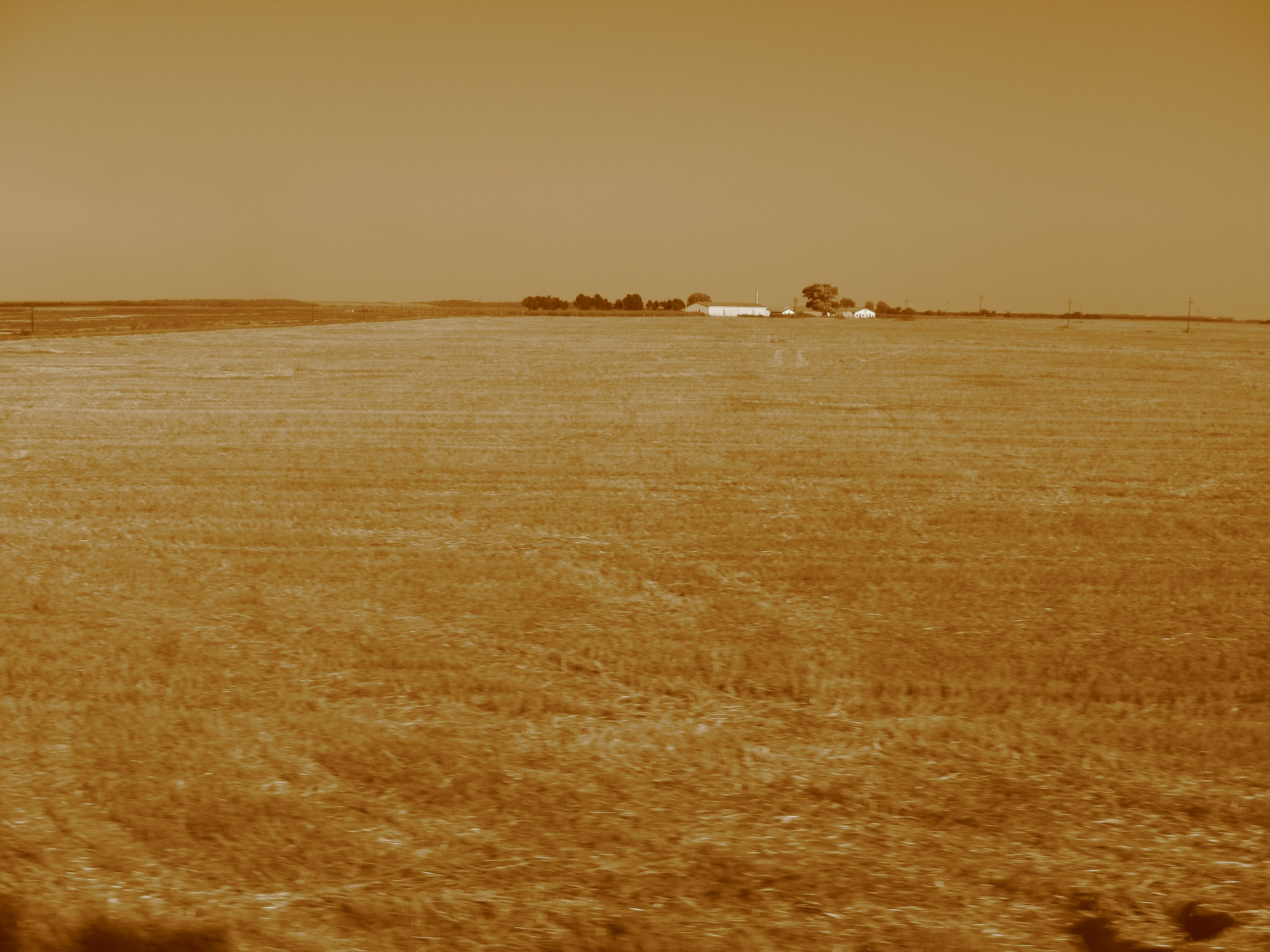 Банат. Сопствена слика, Драган и Јелена Цветковић, Ниш.